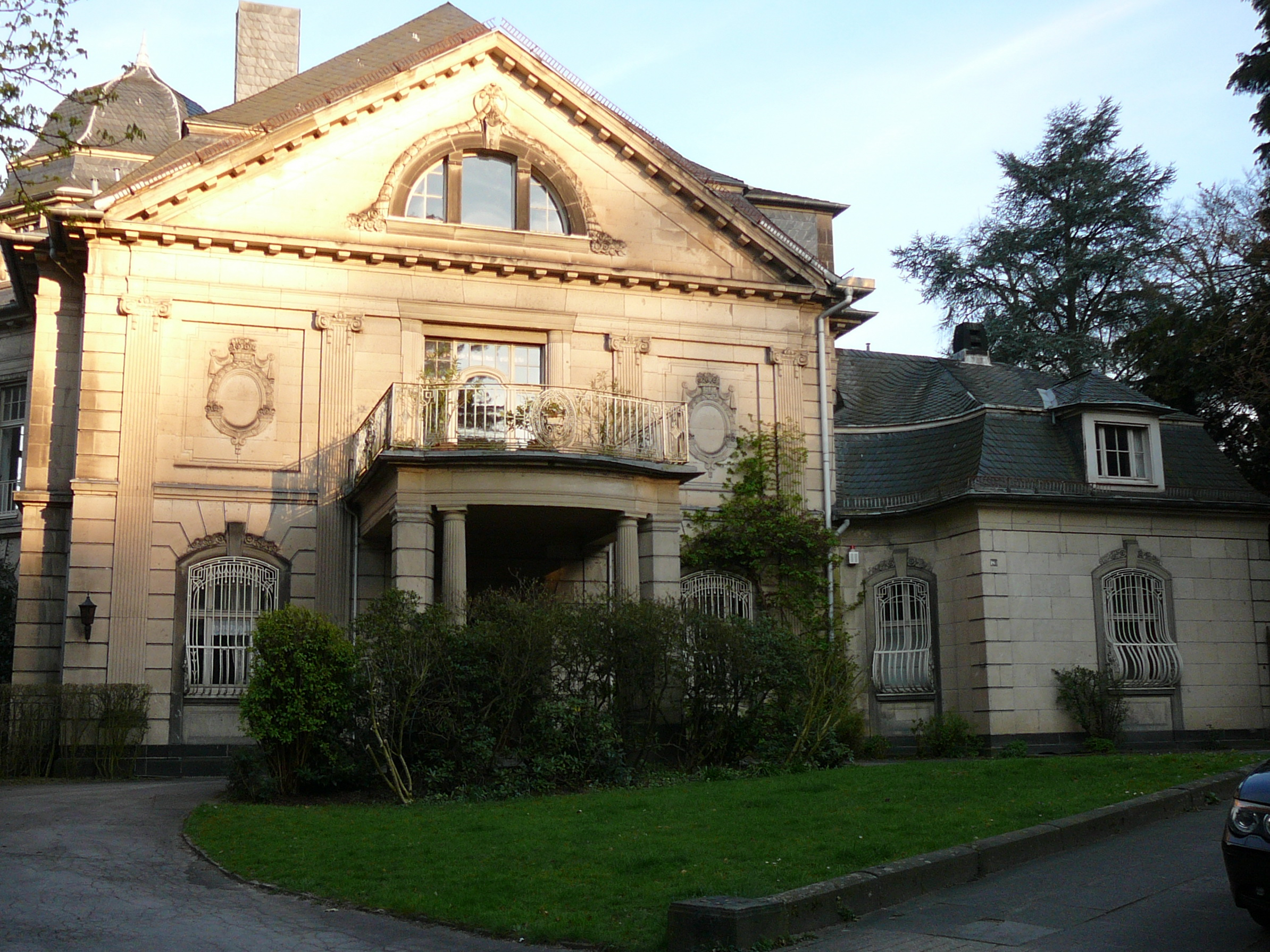 Am Buschhäuschen 70, Wuppertal